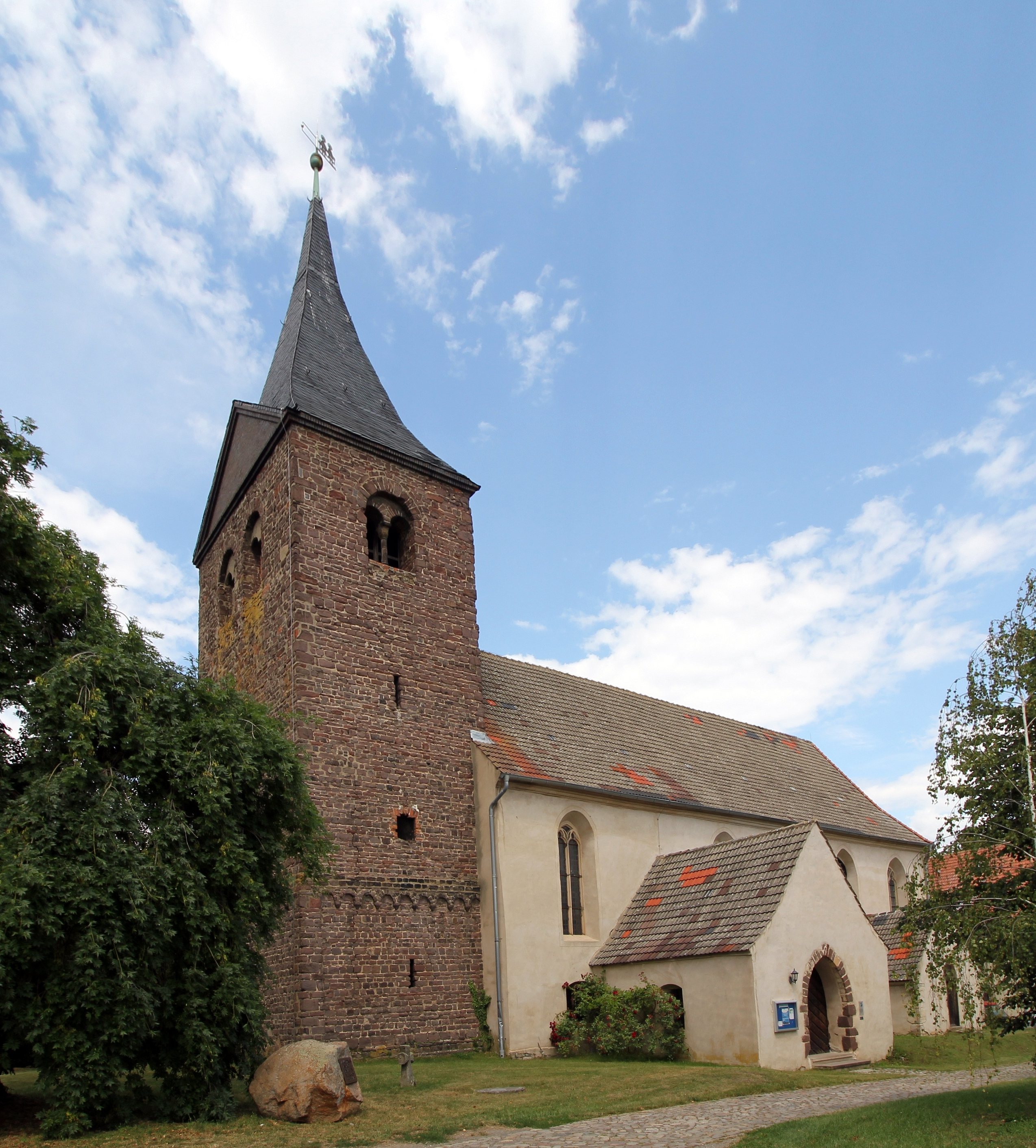 St. Petrus und Paulus Kirche Walter-Rathenau-Straße in Niederndodeleben